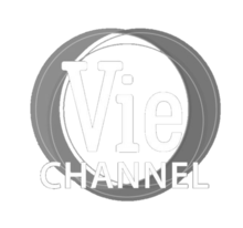 logo Vie Channel